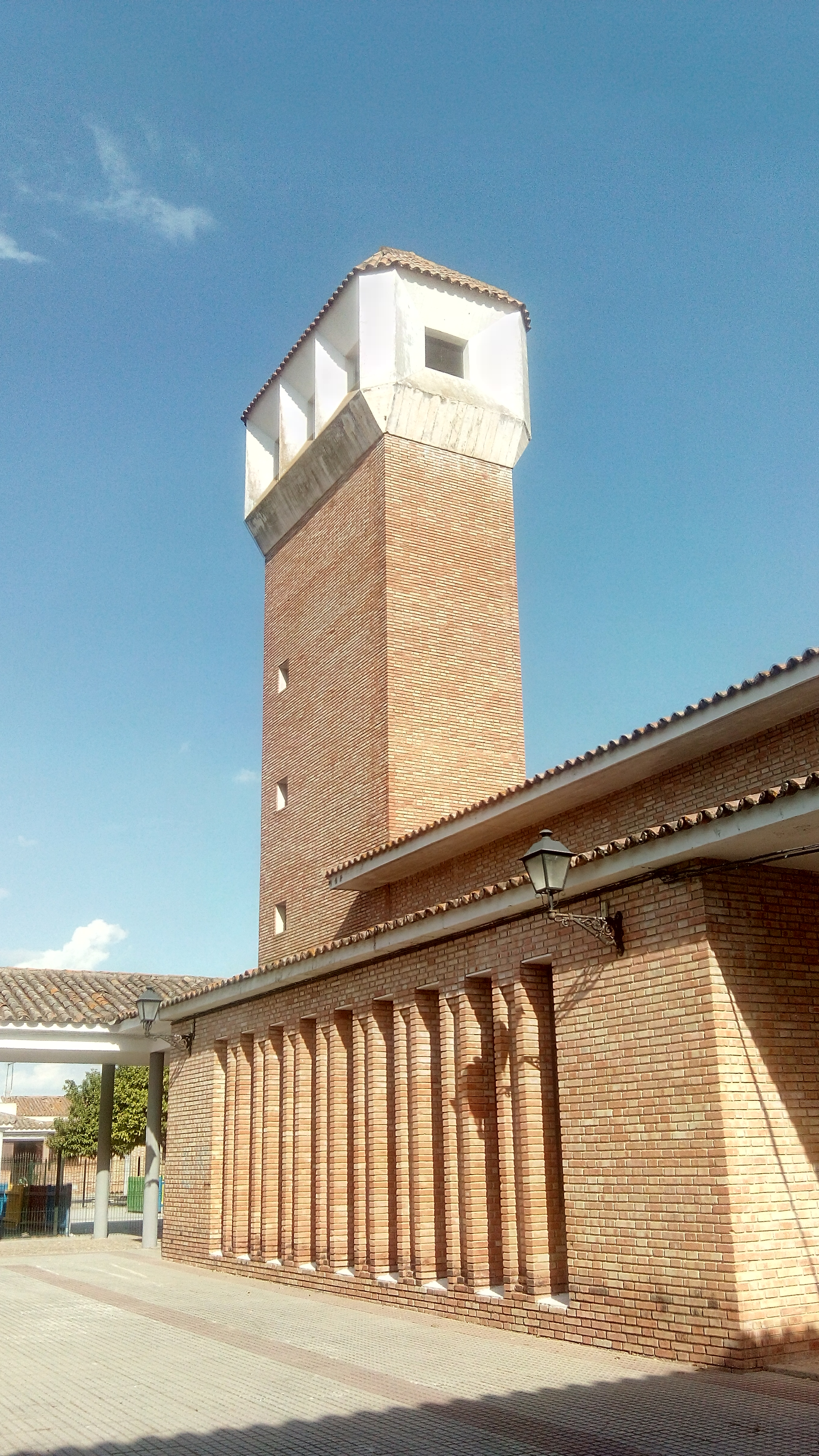 Iglesia